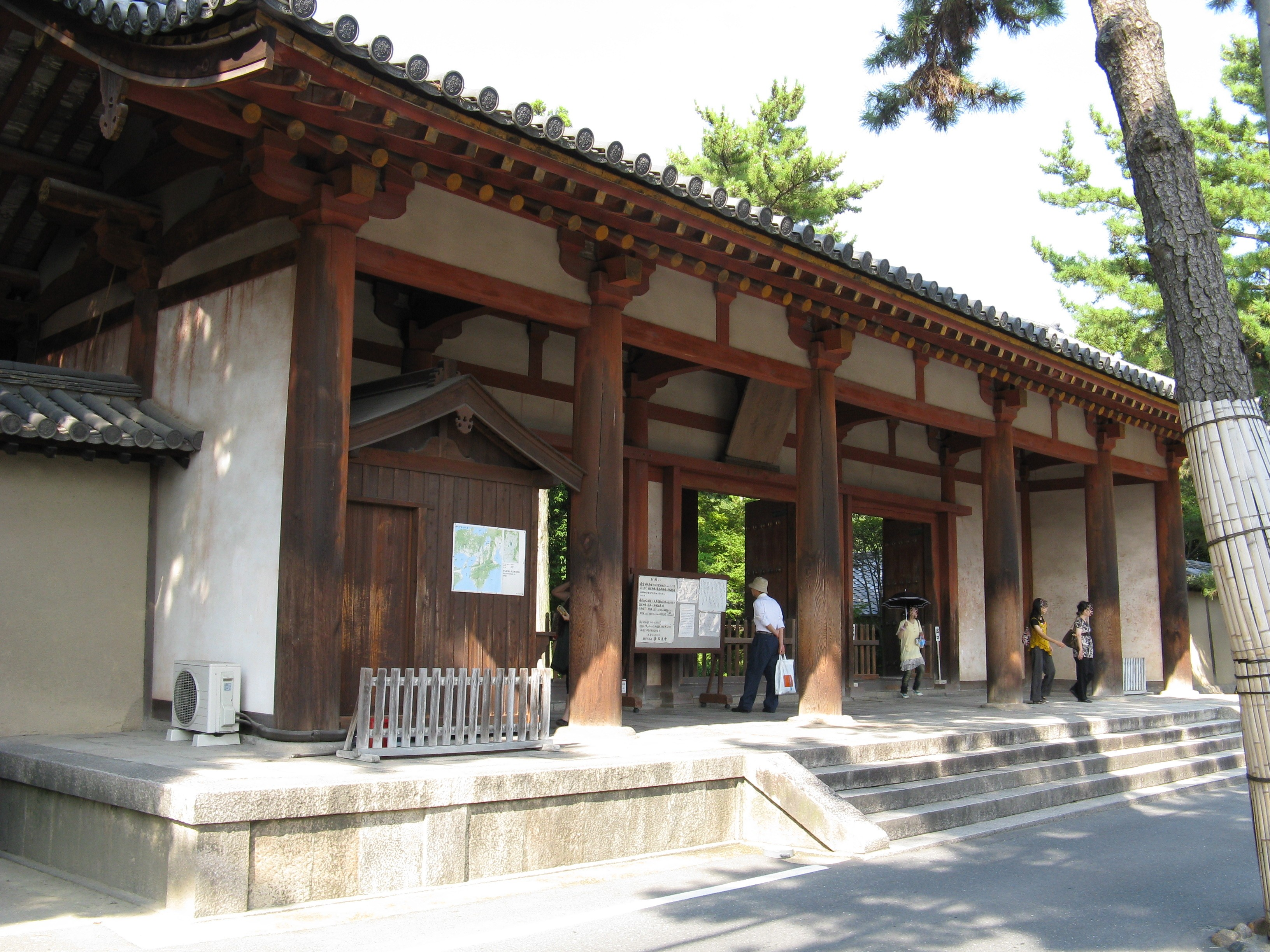 唐招提寺 南大門